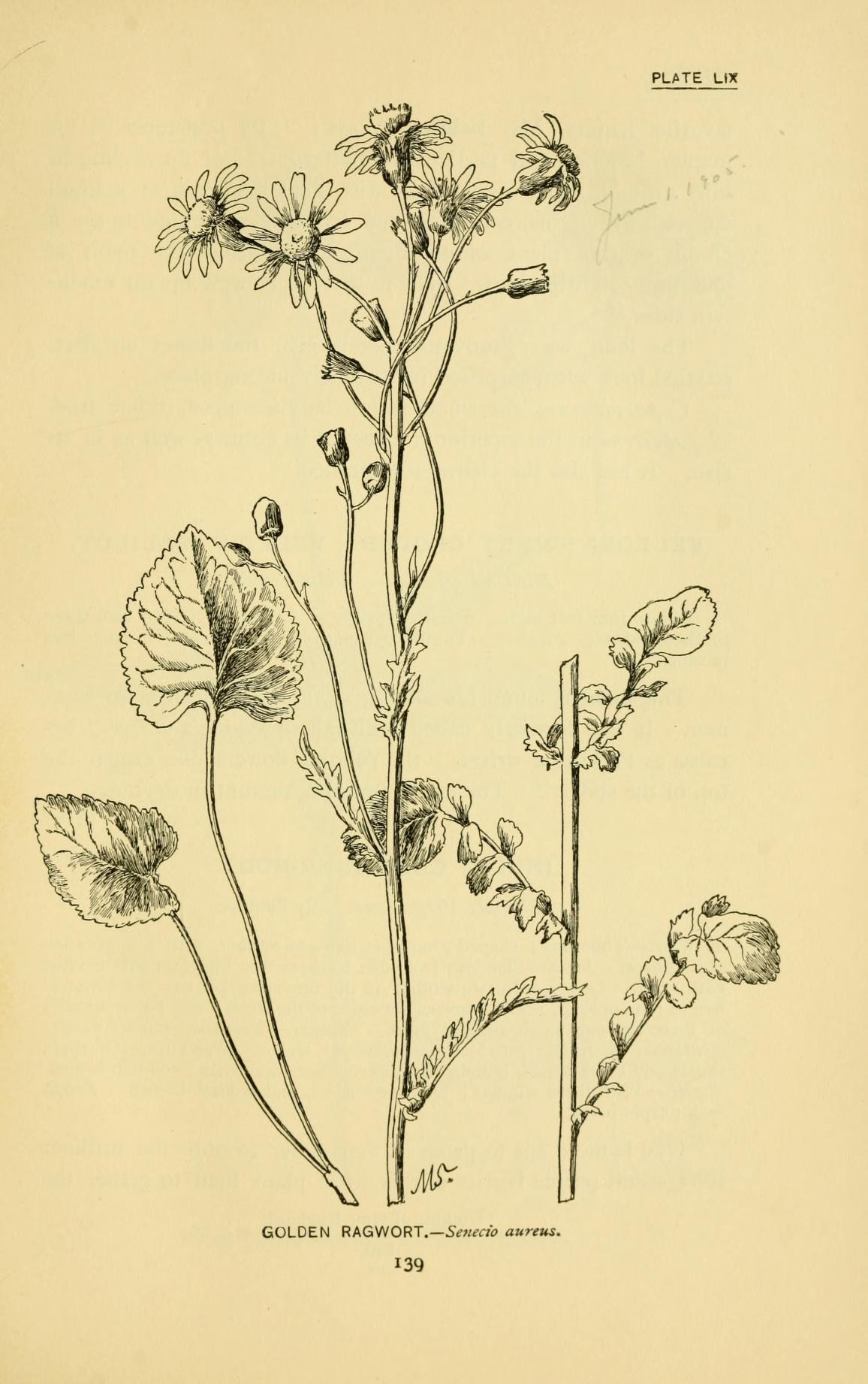 PLATE LIX GOLDEN RAGWORT.— 5^«^(r;.? aureus. 139